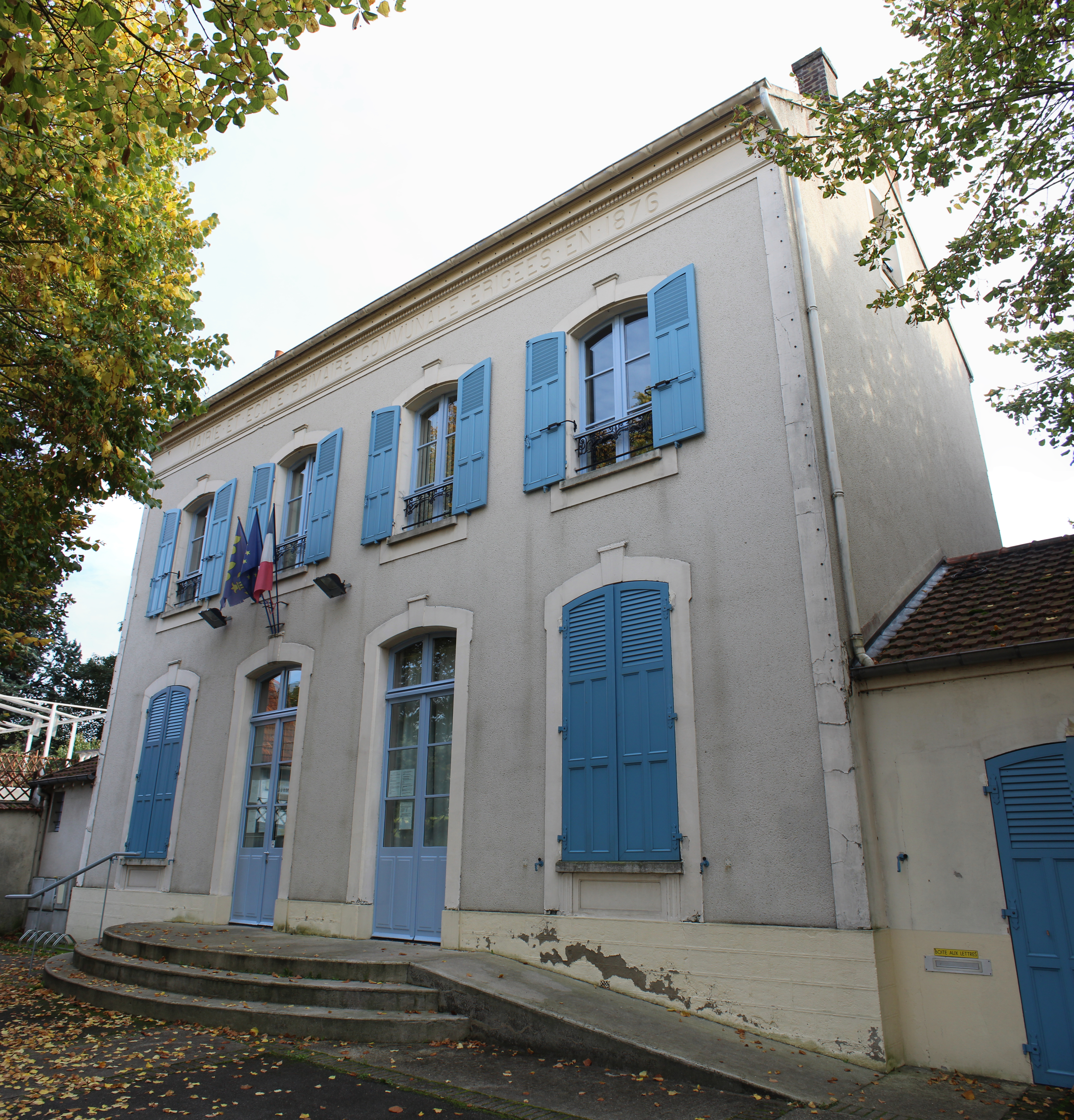 Mairie de Guermantes.